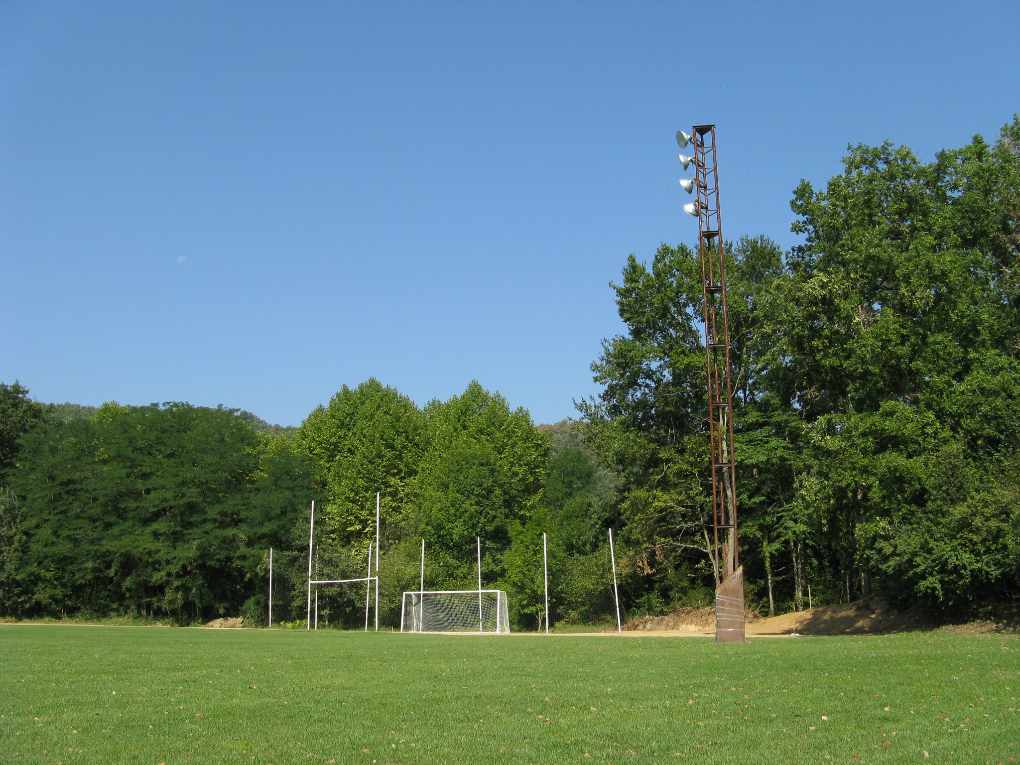 Leichtathletikanlage Olot - angegliedertes Fußball- und Rugby-Feld